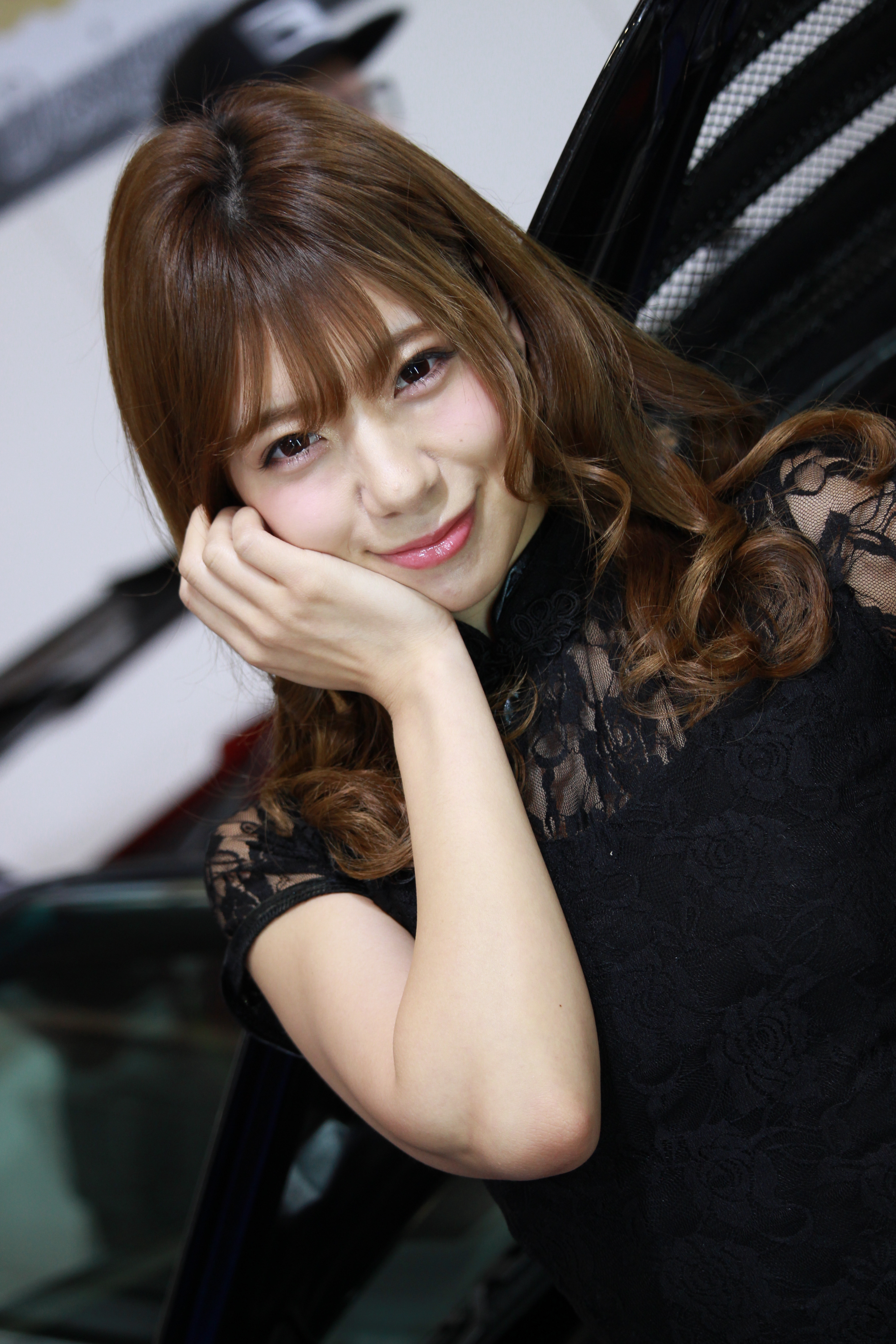 2018年3月に行われた名古屋オートトレンドの八幡ブースにて撮影